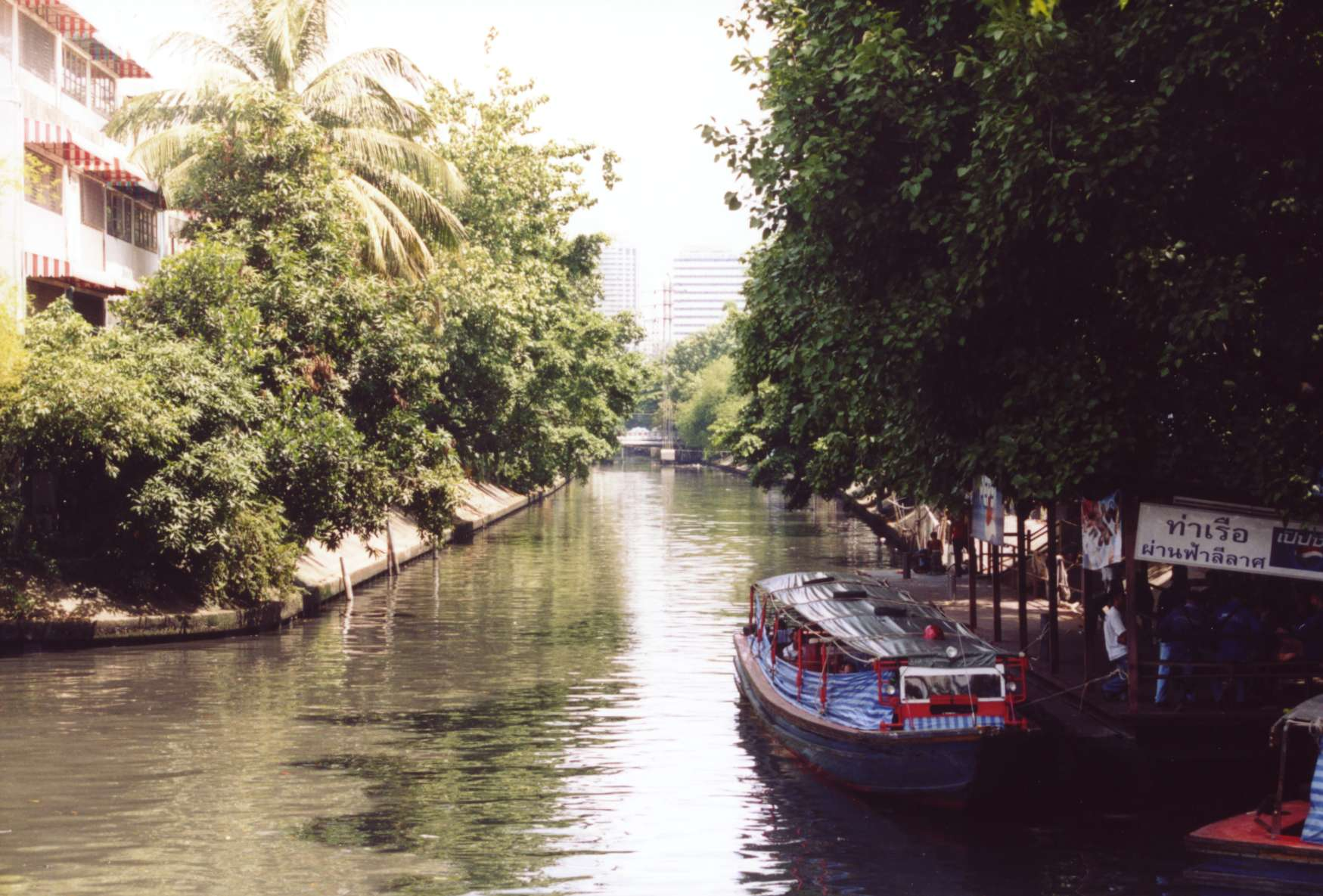 Khlong in Bangkok